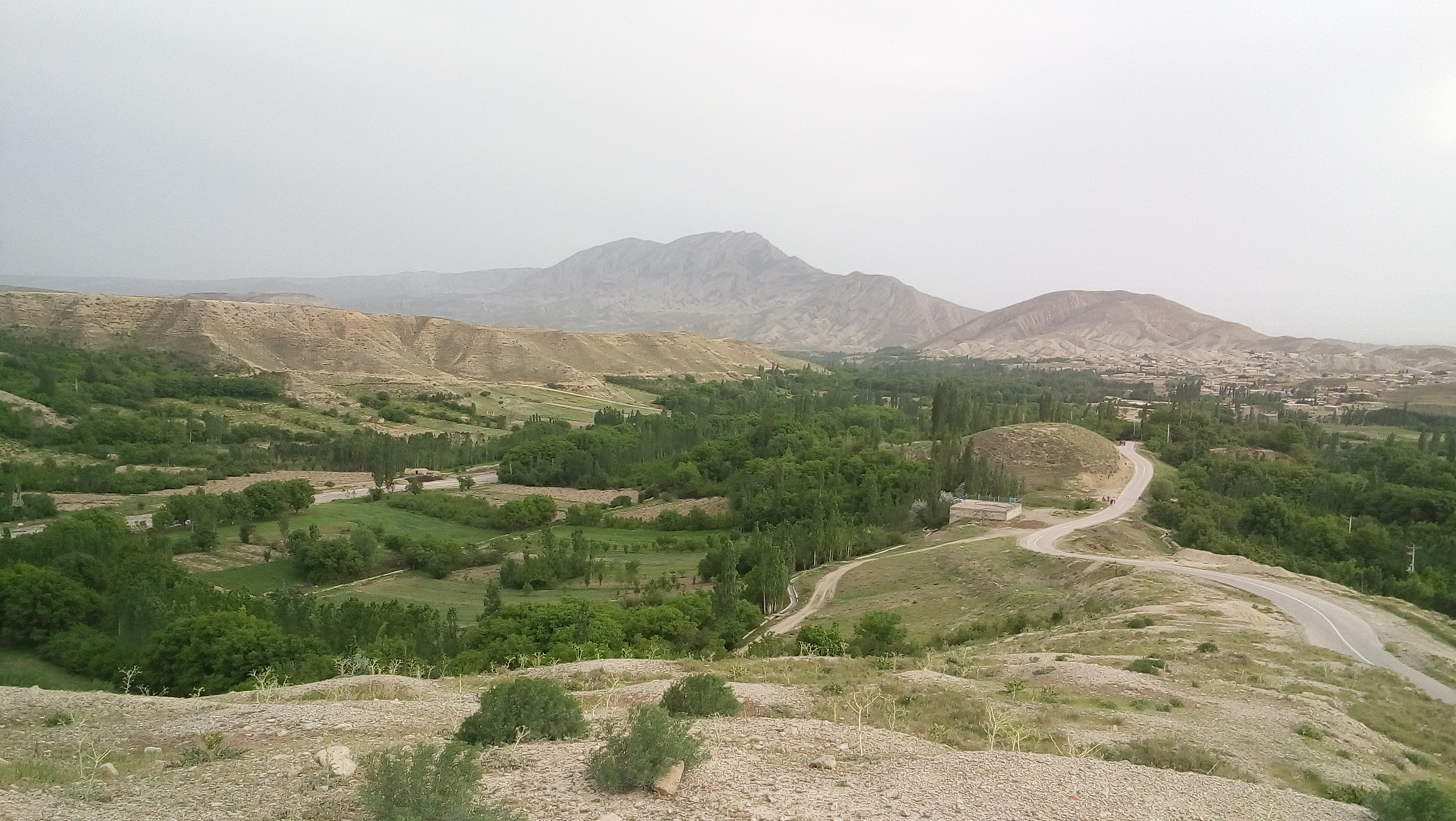 تابستان زیبای کوران ترکیه